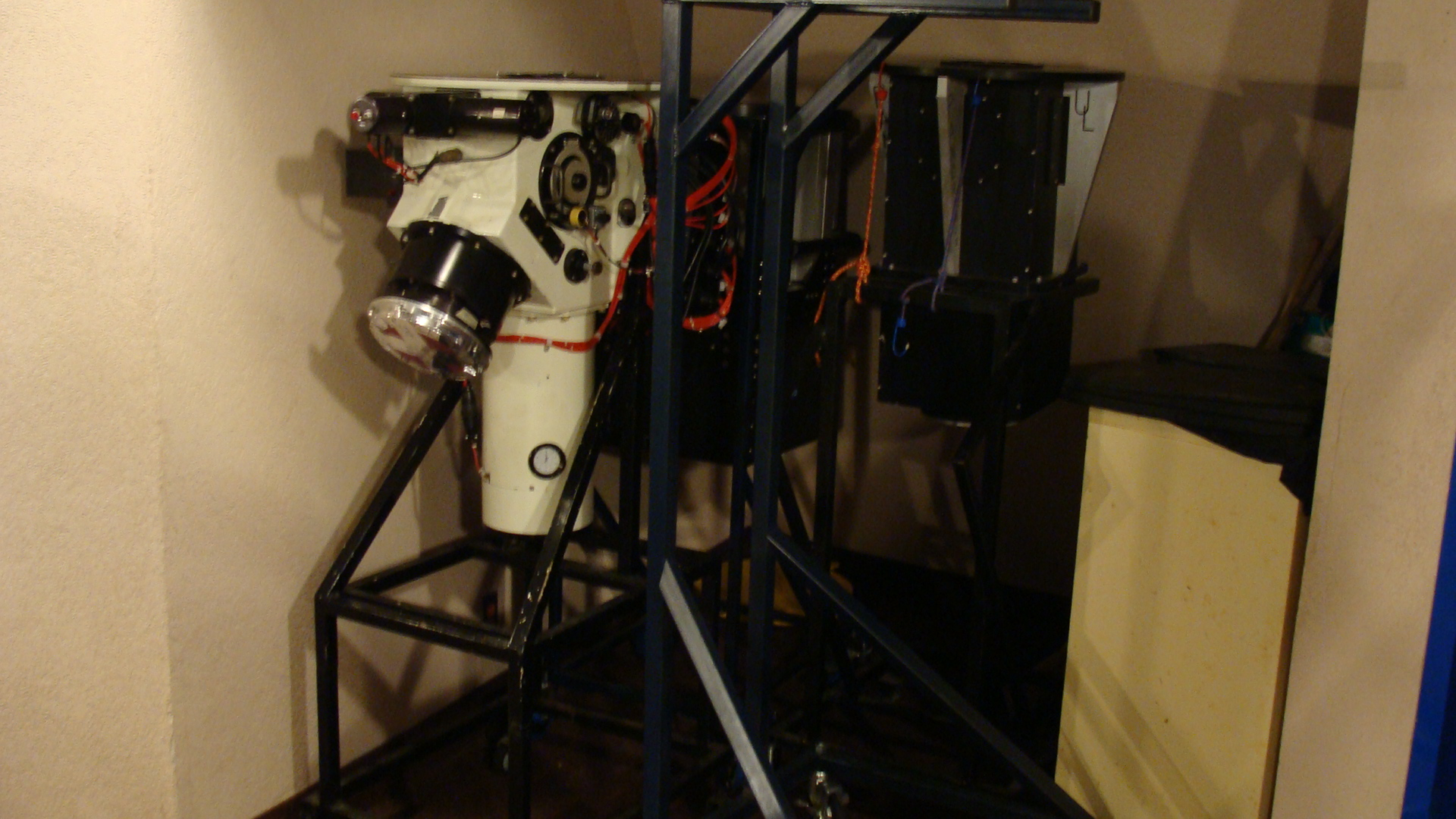 Quelques instruments (spectromètre, panoramix, etc) de l'Observatoire du mont Mégantic, au Québec (Canada)